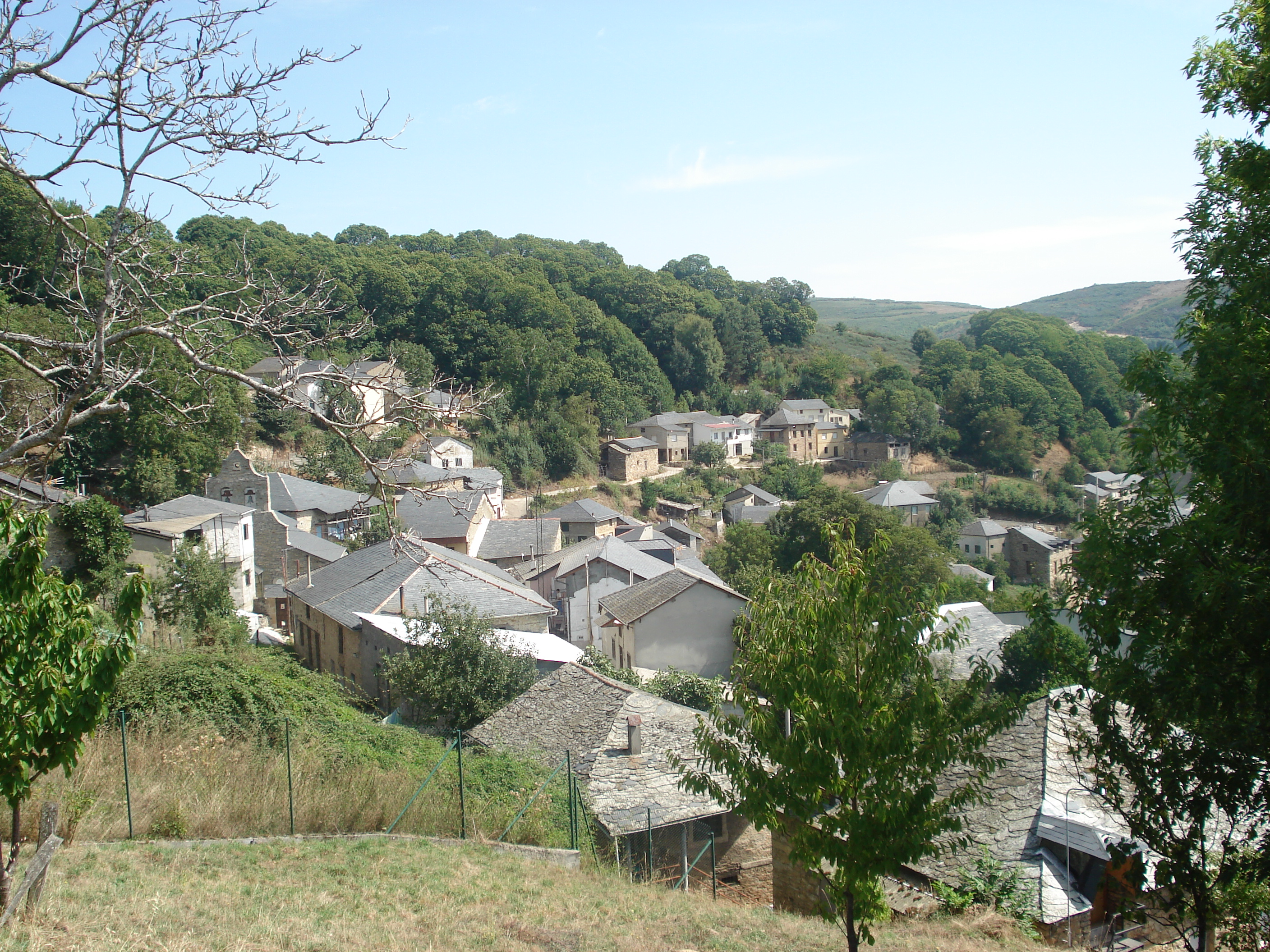 arriba